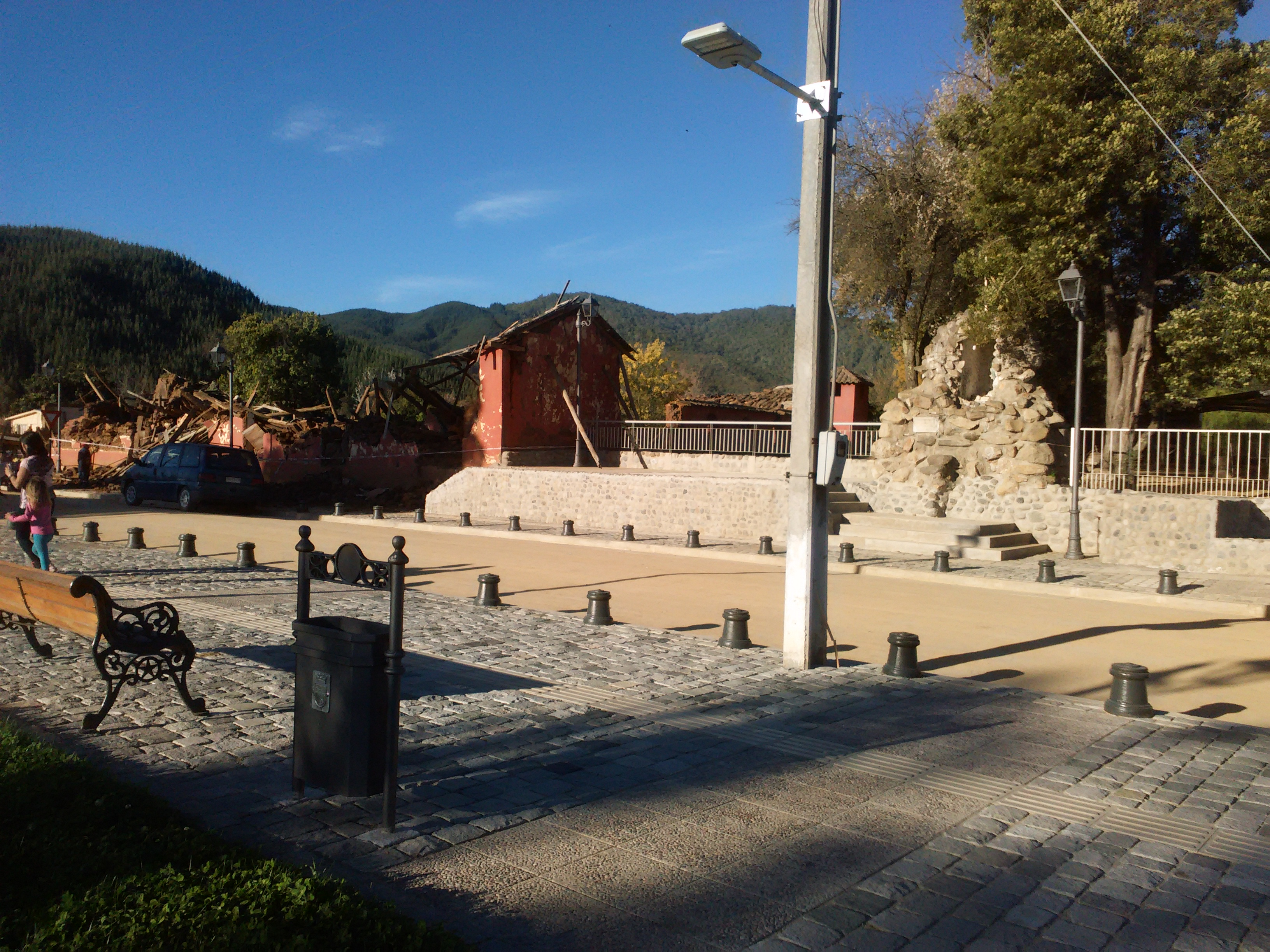 Imagen de la plaza de armas del pueblo de Huerta del Maule, VII regiòn, Chile.